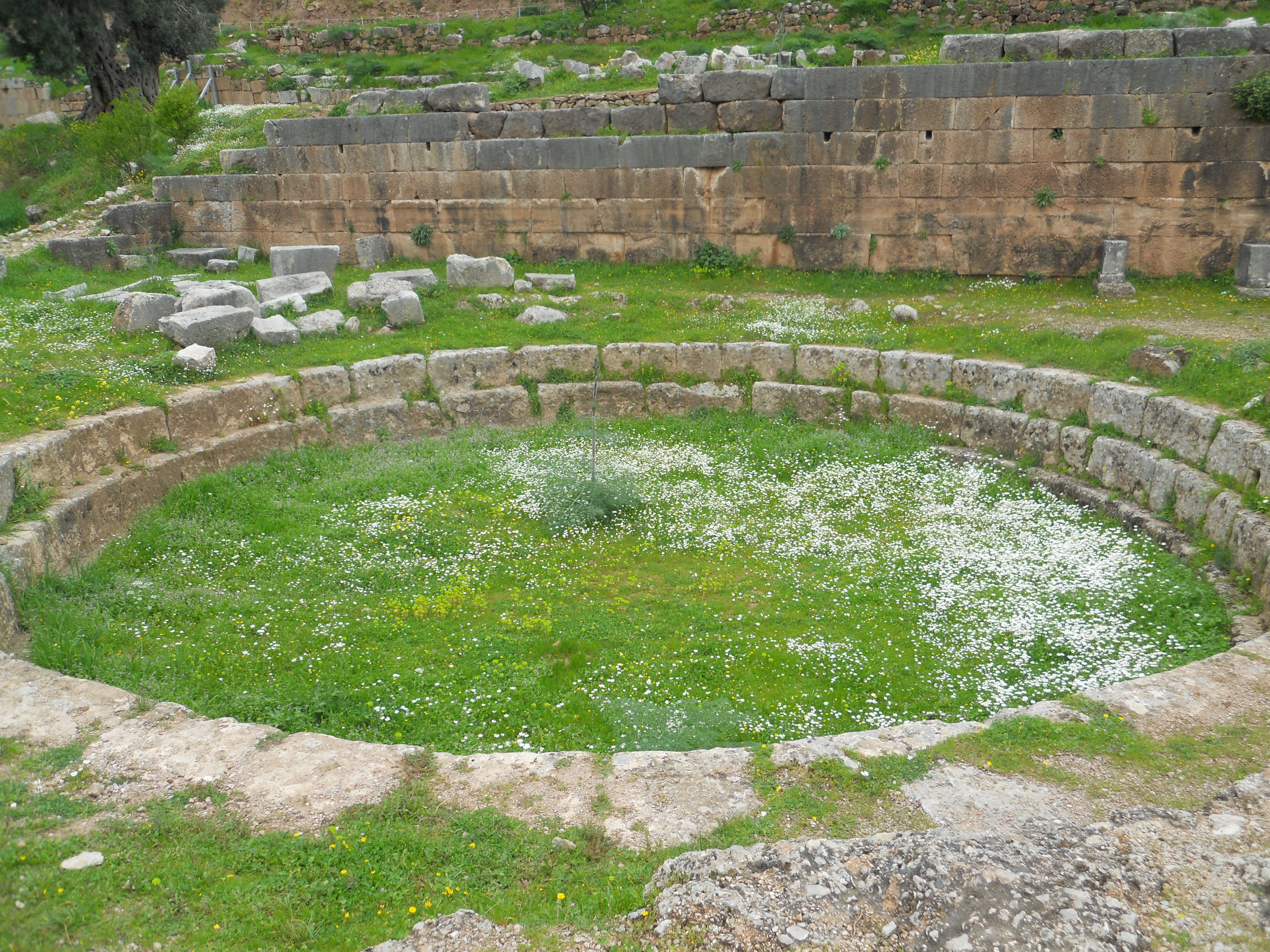 Greek Bath